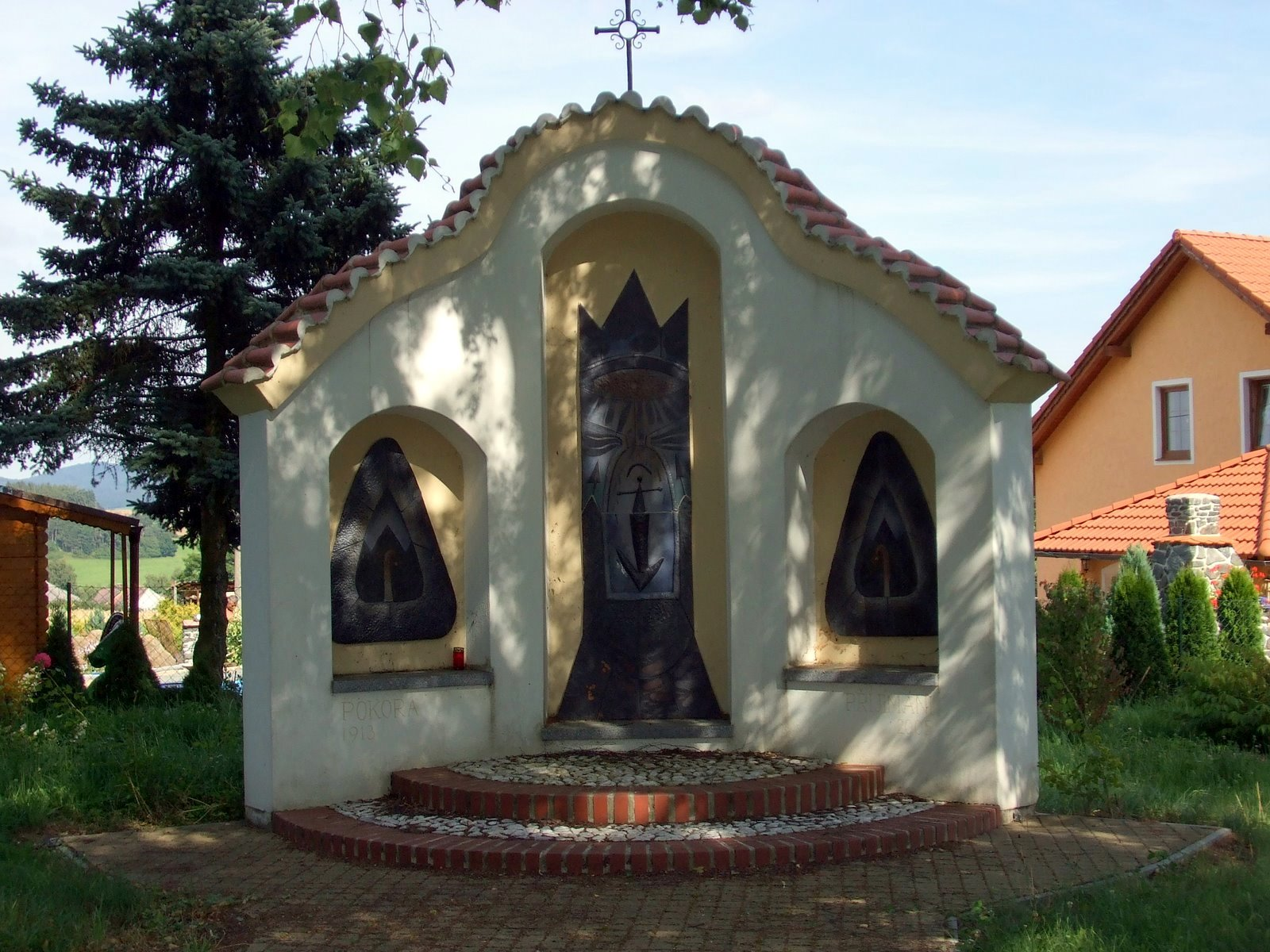 Česky: Kaplička v Mrákově u hřbitova